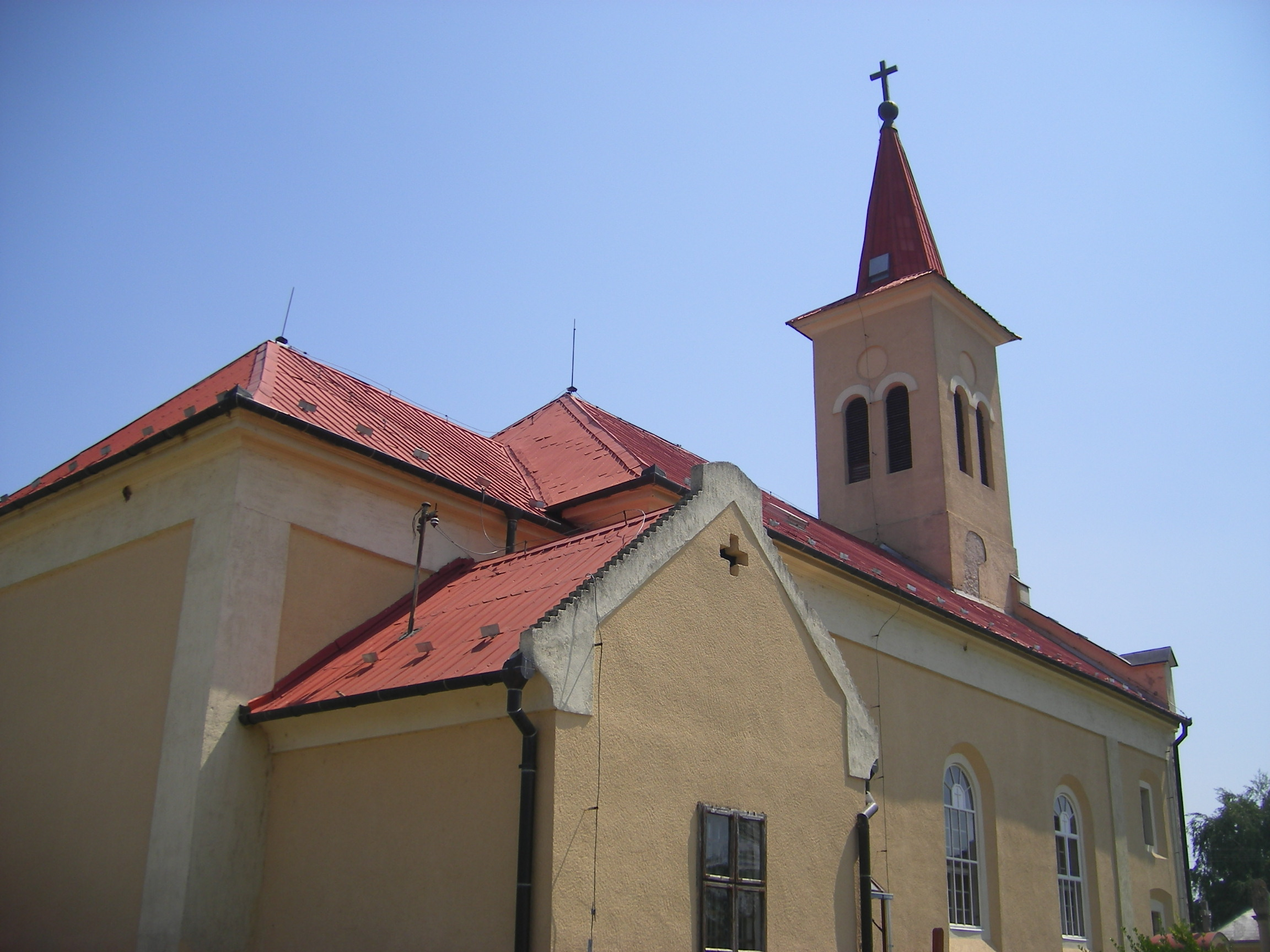 Újgyalla - Katolikus templom